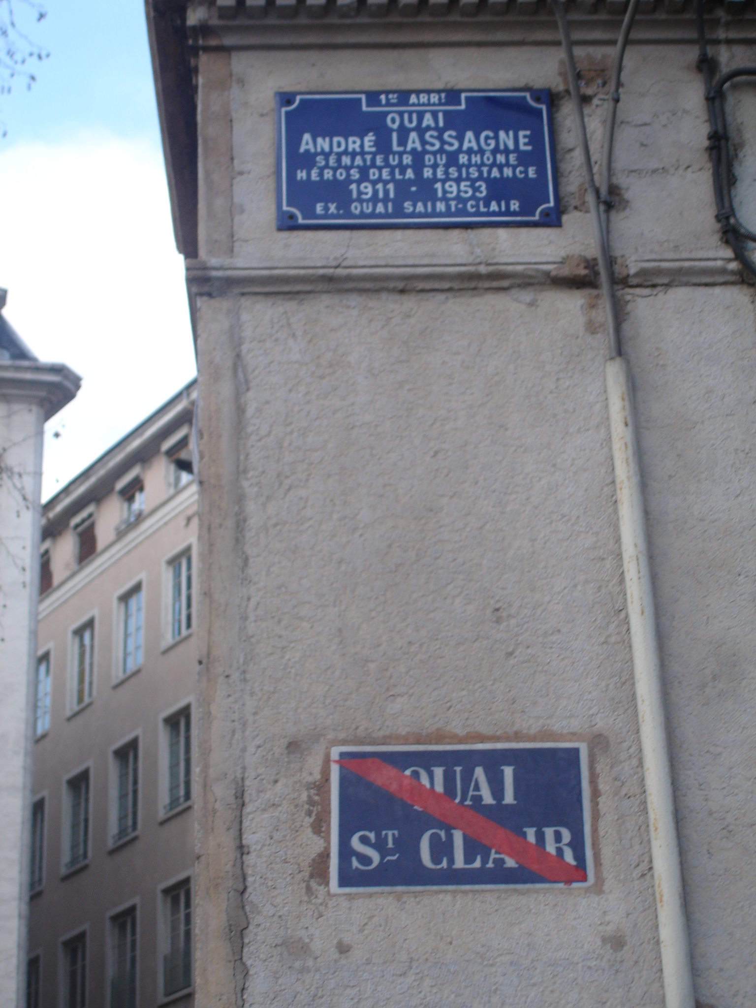 Lyon : quai Lassagne, ex quai Saint-Clair. Plaque de rue au coin de la place Tolozan, qui marque la fin de ce quai (extrémité sud, vers l'aval) et le début du quai Jean Moulin.